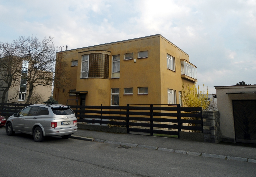 Libišská ulice